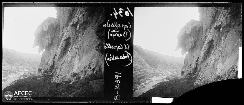 Imatge